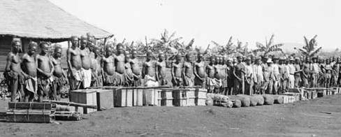 Expédition des américains James Paul Chapin et Herbert Lang (1909 - 1915). Celle-ci partit d'Anvers pour Boma puis remonta le fleuve Congo jusqu'aux environs de Stanleyville.